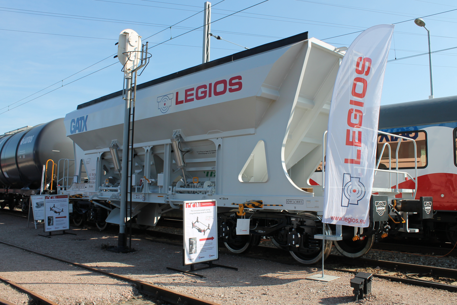 Wagon samowyładowczy Faccns podczas targów Trako 2015. The making of this document was supported by Wikimedia Polska Association, within Wikigrant no. WG 2015-34. English | polski | +/−